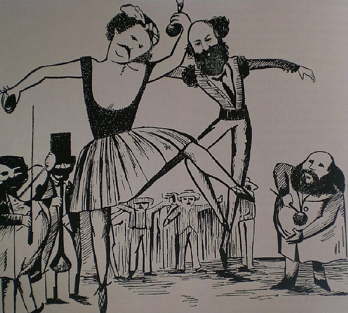 Caricature of Juan Crisóstomo Falcón and Antonio Guzmán Blanco dancing La Bamba in public.